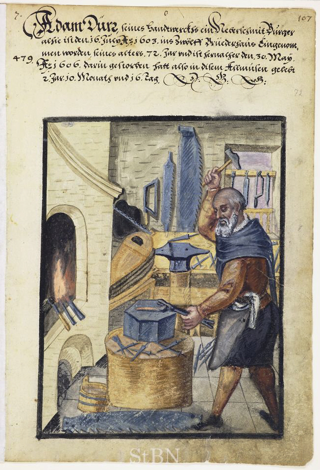 Adam Dürr, Neberschmit (Neberschmied) Transkription und weitere Informationen